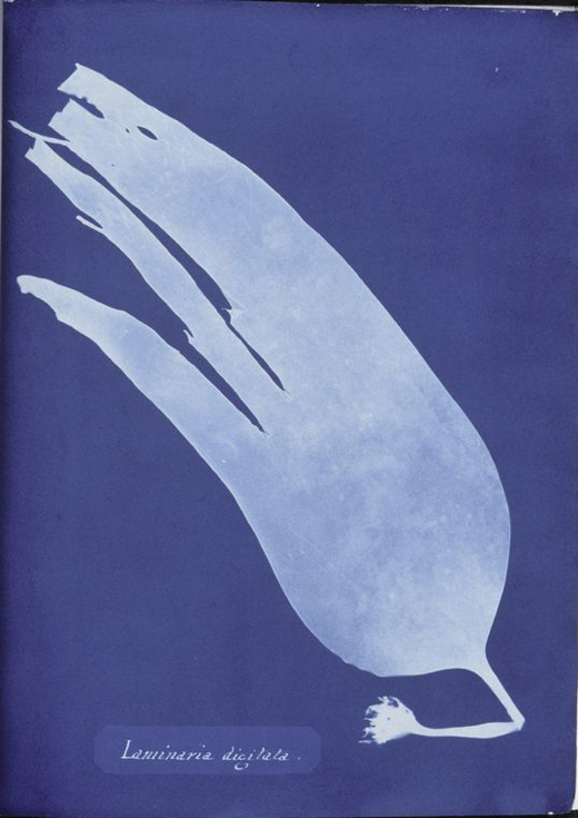 Laminaria digitata. Cyanotype photogram.